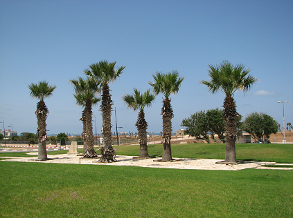 אנדרטת כיכר ניו יורק באשקלון.